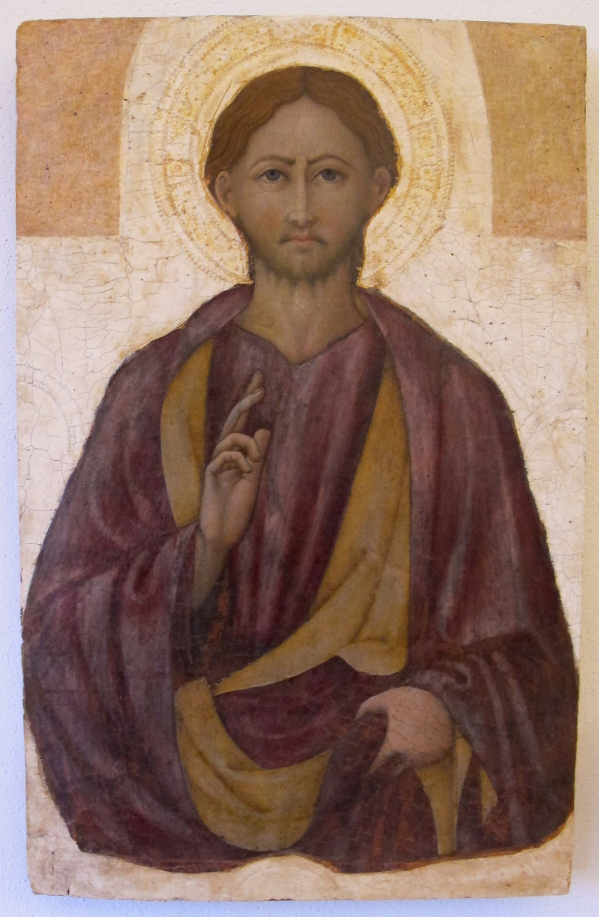 Museo diocesano (Siena)